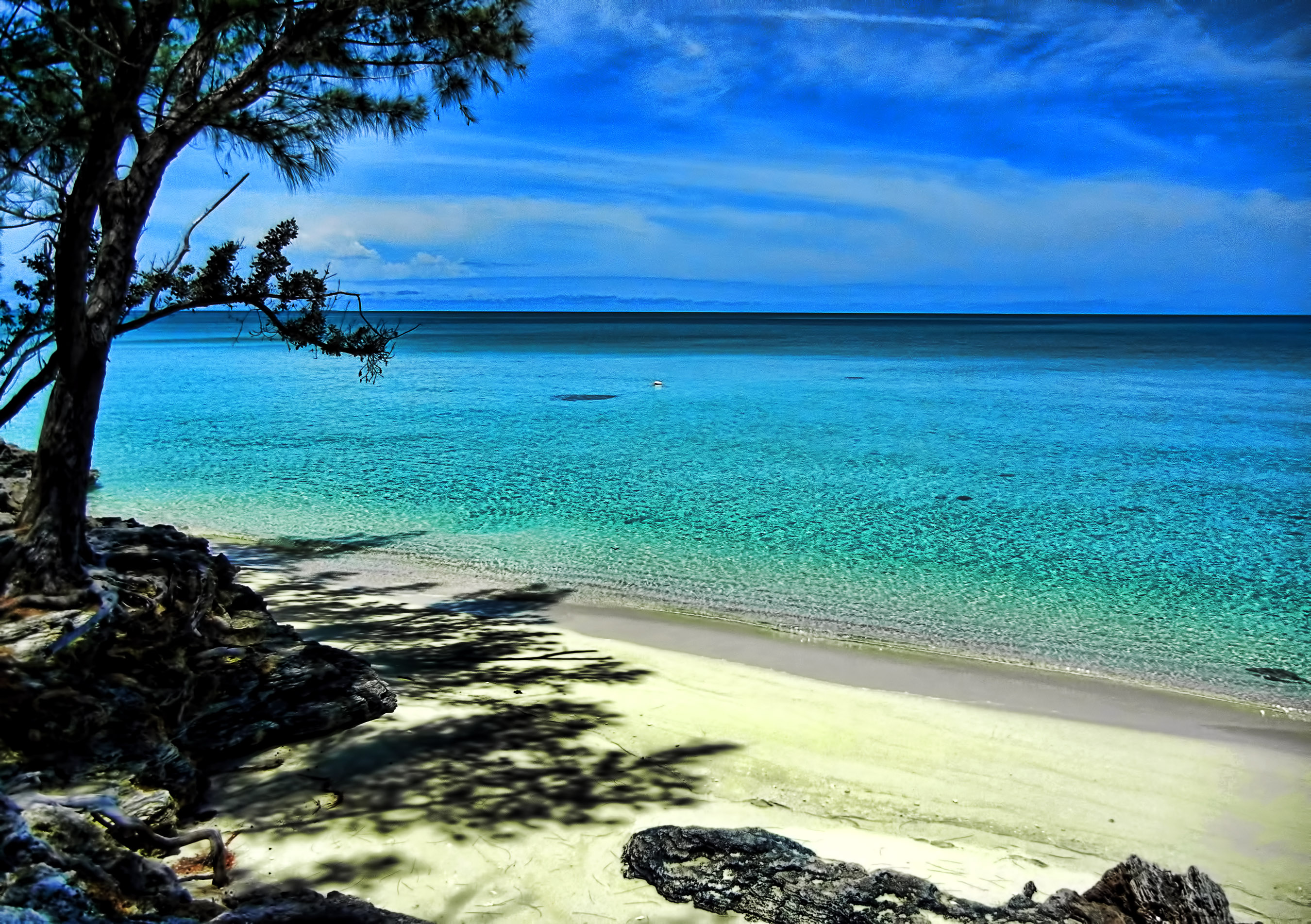 Eleuthera, Bahamas